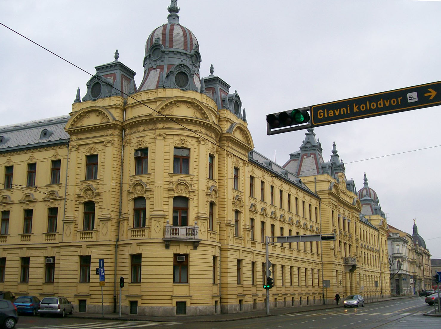 Upravna zgrada Hrvatskih željeznica u Zagrebu